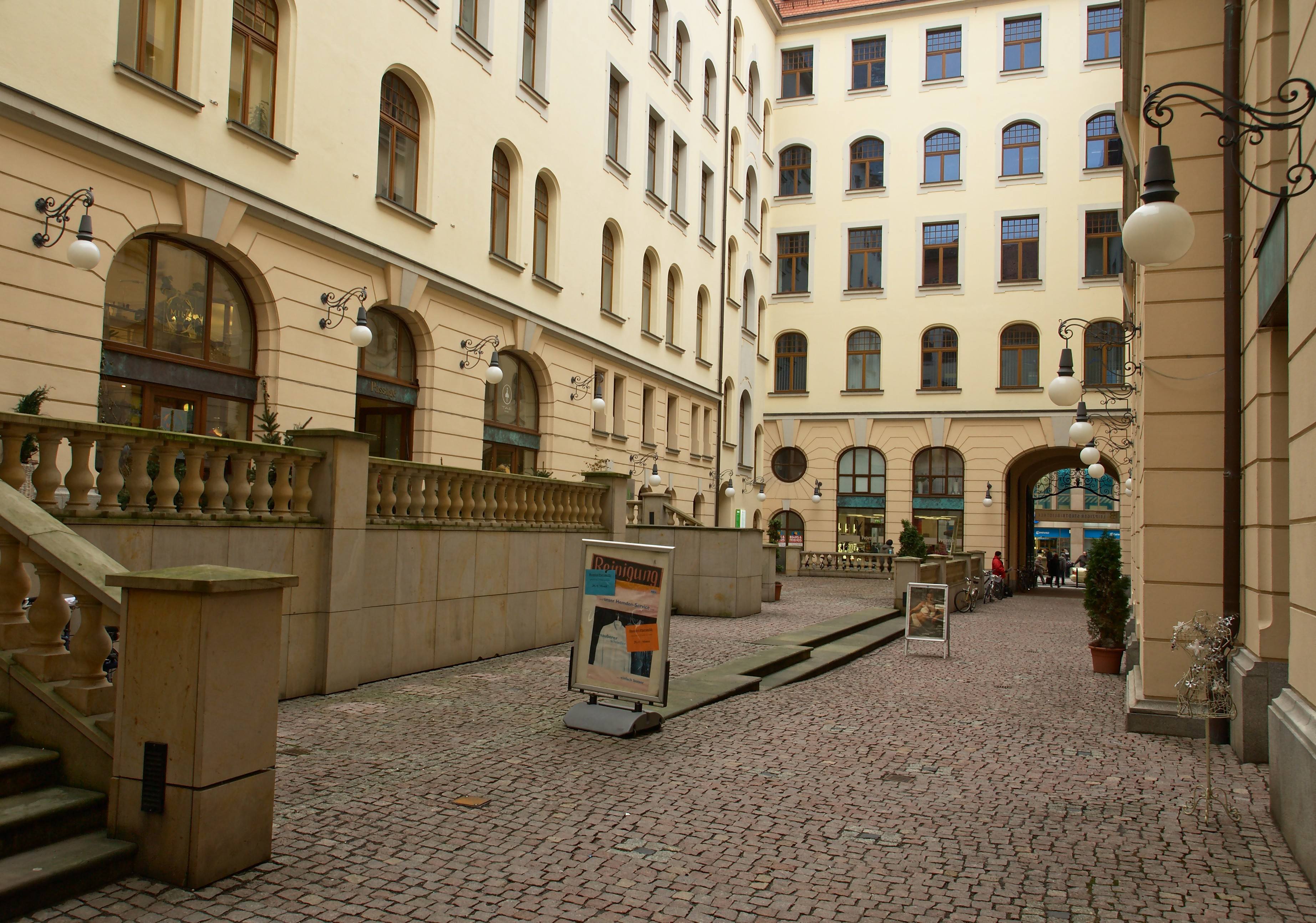 Innenhof Städtisches Kaufhaus, Leipzig 2011